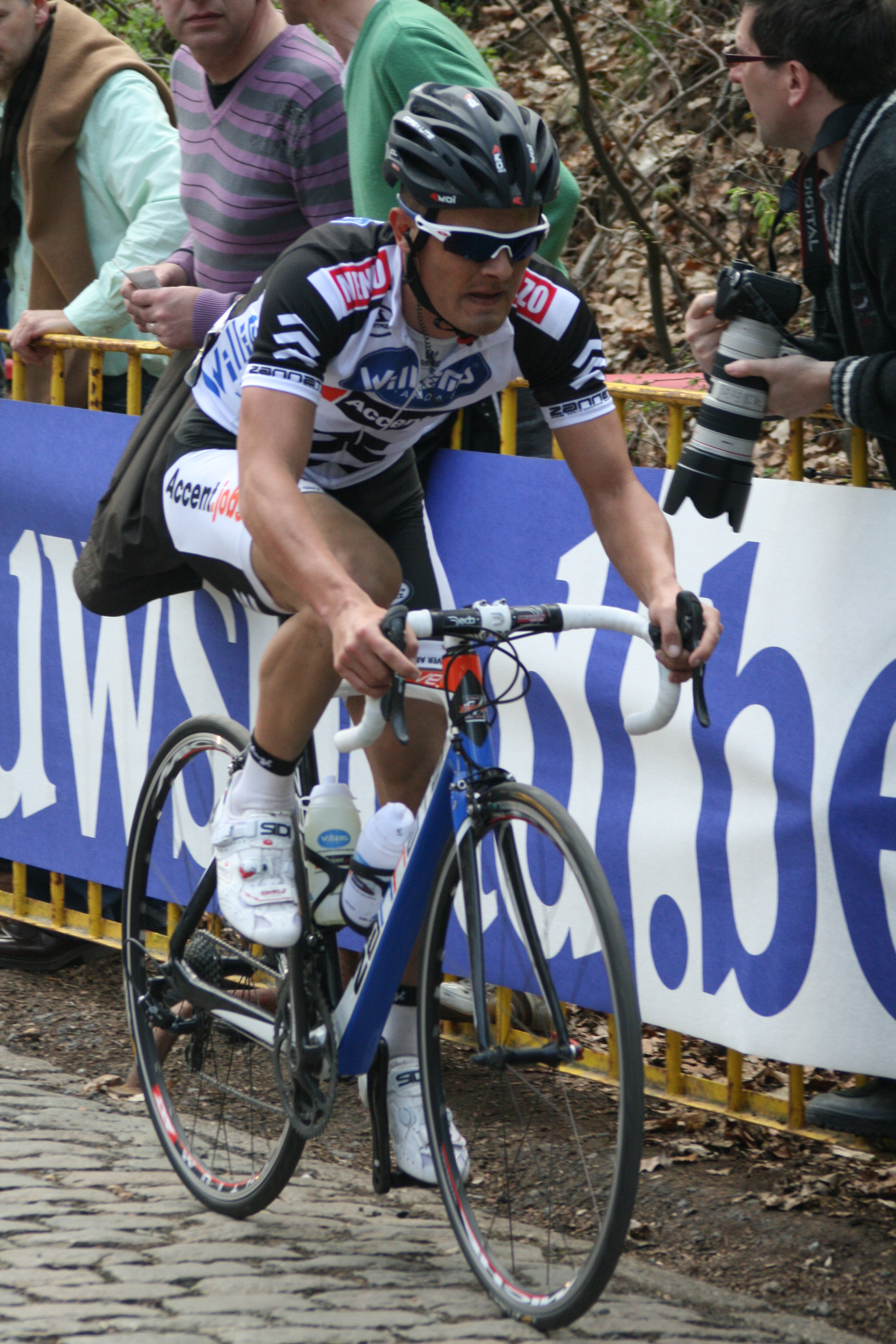 Gent-Wevelgem 2011, Kemmelberg